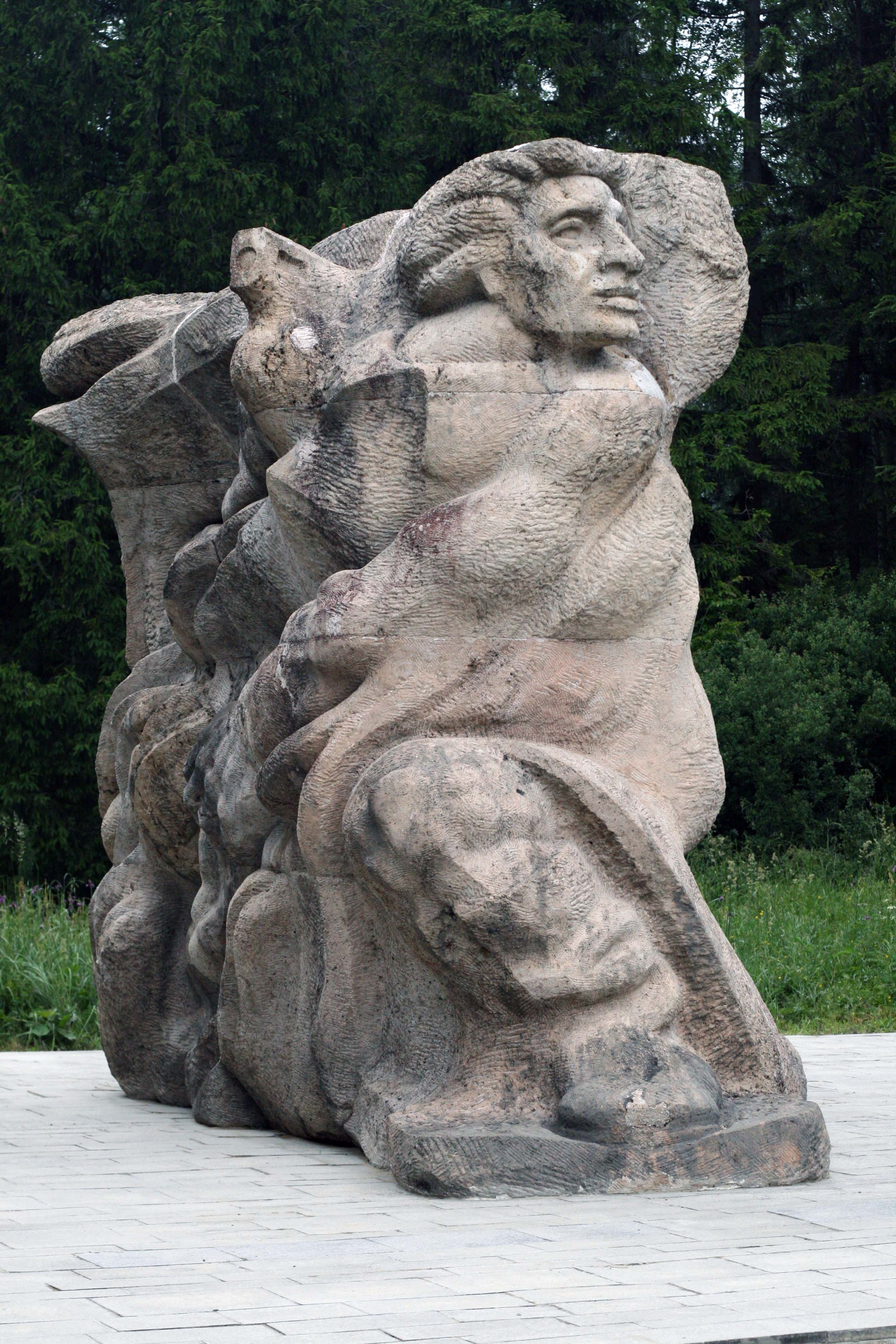 Pieskovcová plastika na štátnej hranici s Poľskou republikou v priestoroch Duklianskeho priesmyku na miestach kde prekročila prieskumná hliadka 1. čsaz